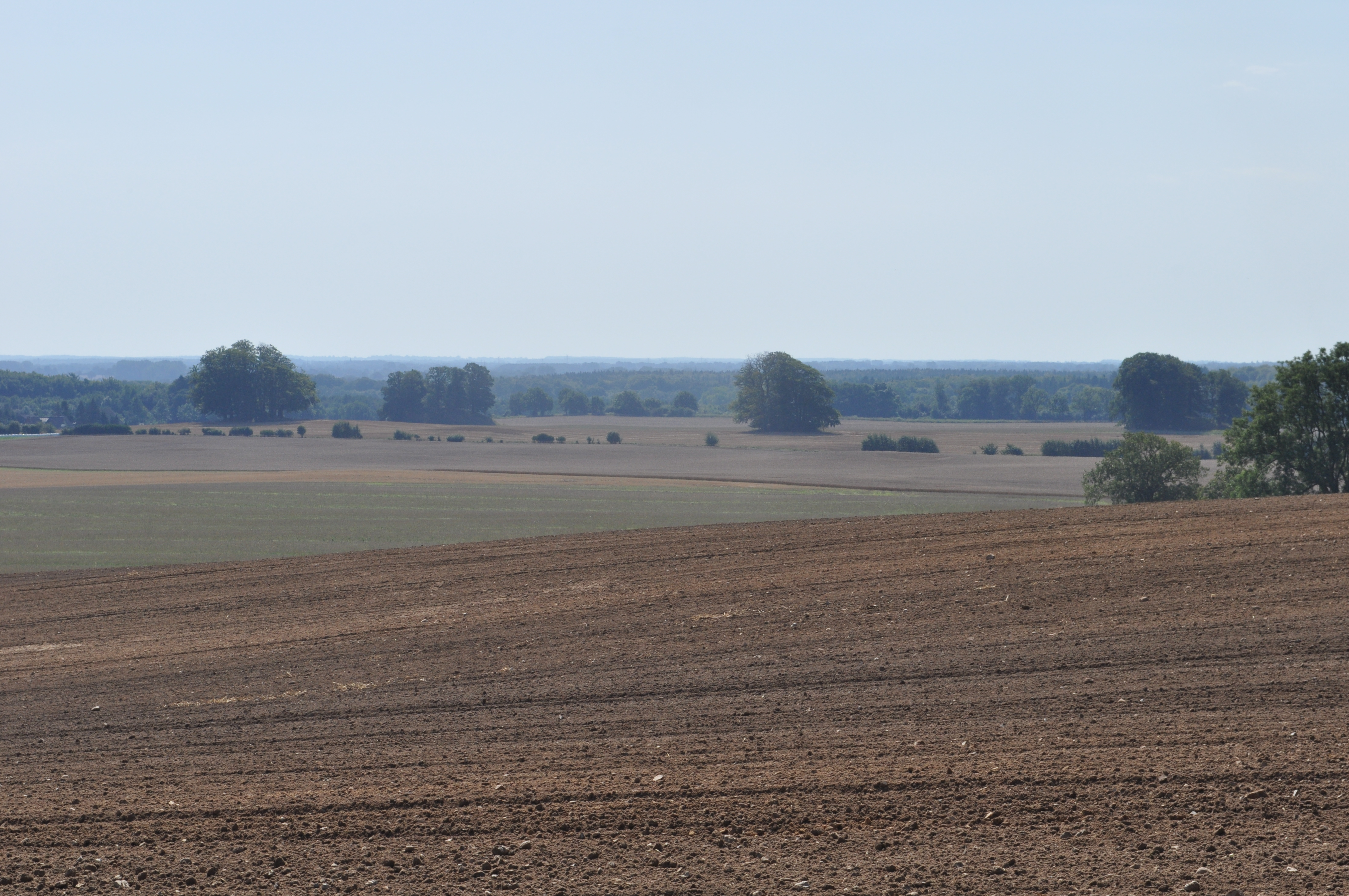 Blick vom Klingberg auf die Hügelgräber bei Grabau (Stormarn).